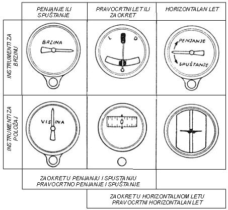 Kategorija:Zrakoplovni instrumenti